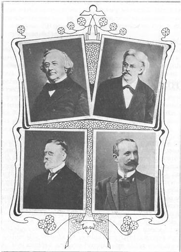 Od lewej Eugen Naumman, Herman Kohleis, Muller, Richard Witting